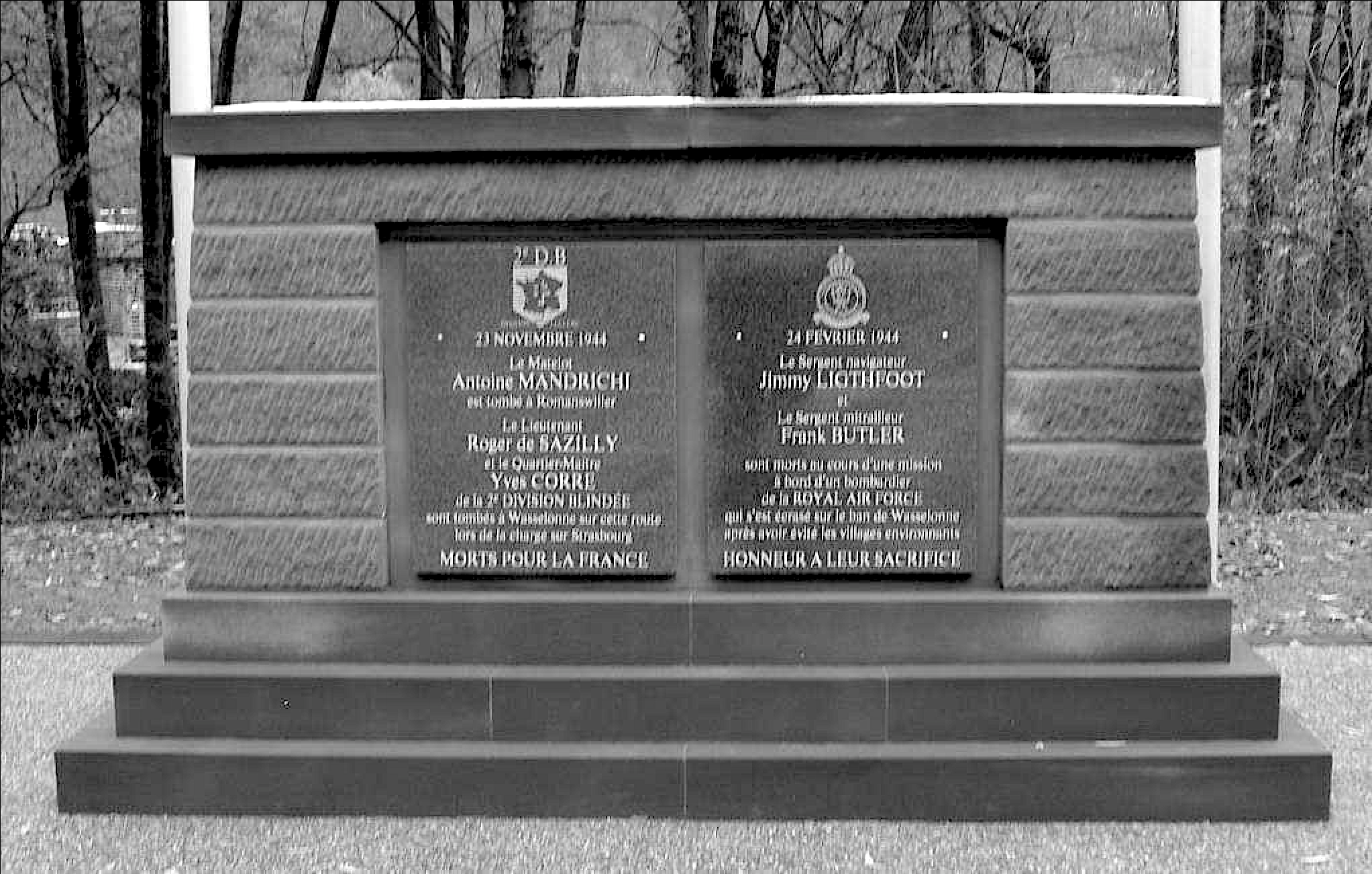 Wasselonne au Kronthal, le mémorial des soldats de la 2ème division Blindée et de la RAF morts pendant la seconde Guerre Mondiale.